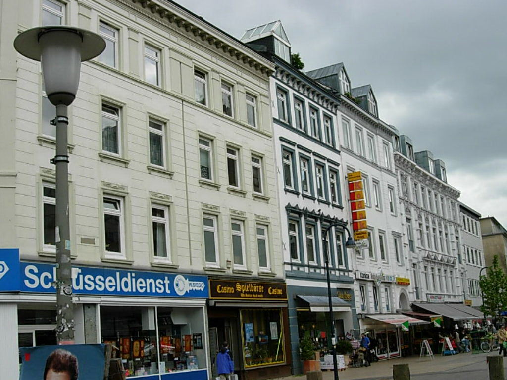 Große Bergstraße in Altona-Altstadt, Altbauseite.